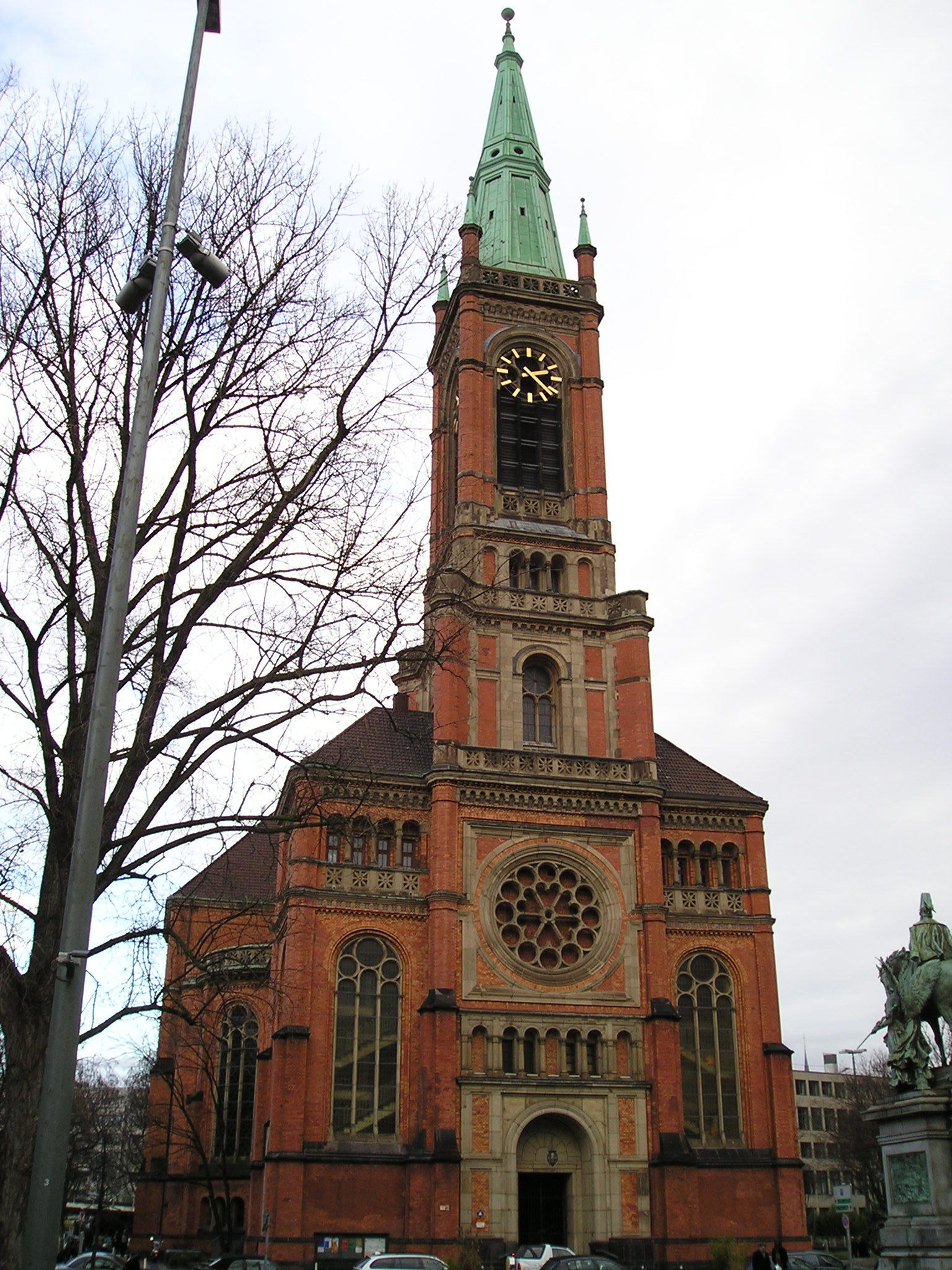 Johanneskirche in Düsseldorf